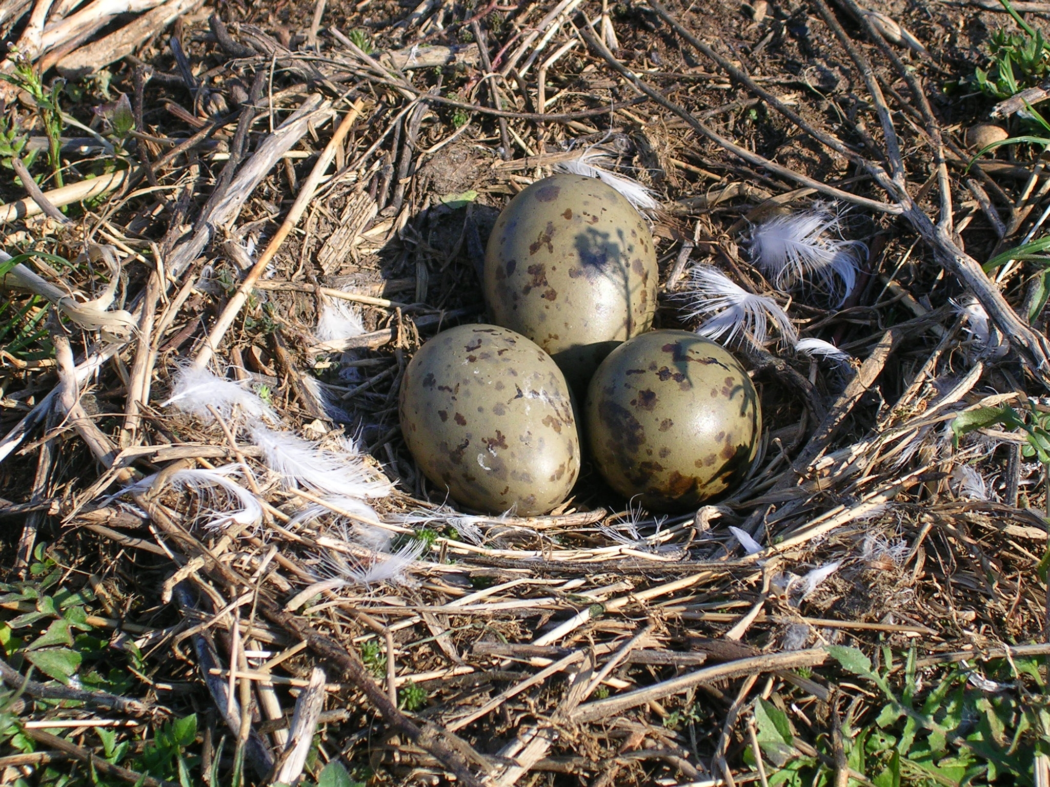 Gelege der Sturmmöwe (Larus canus) mit drei Eiern